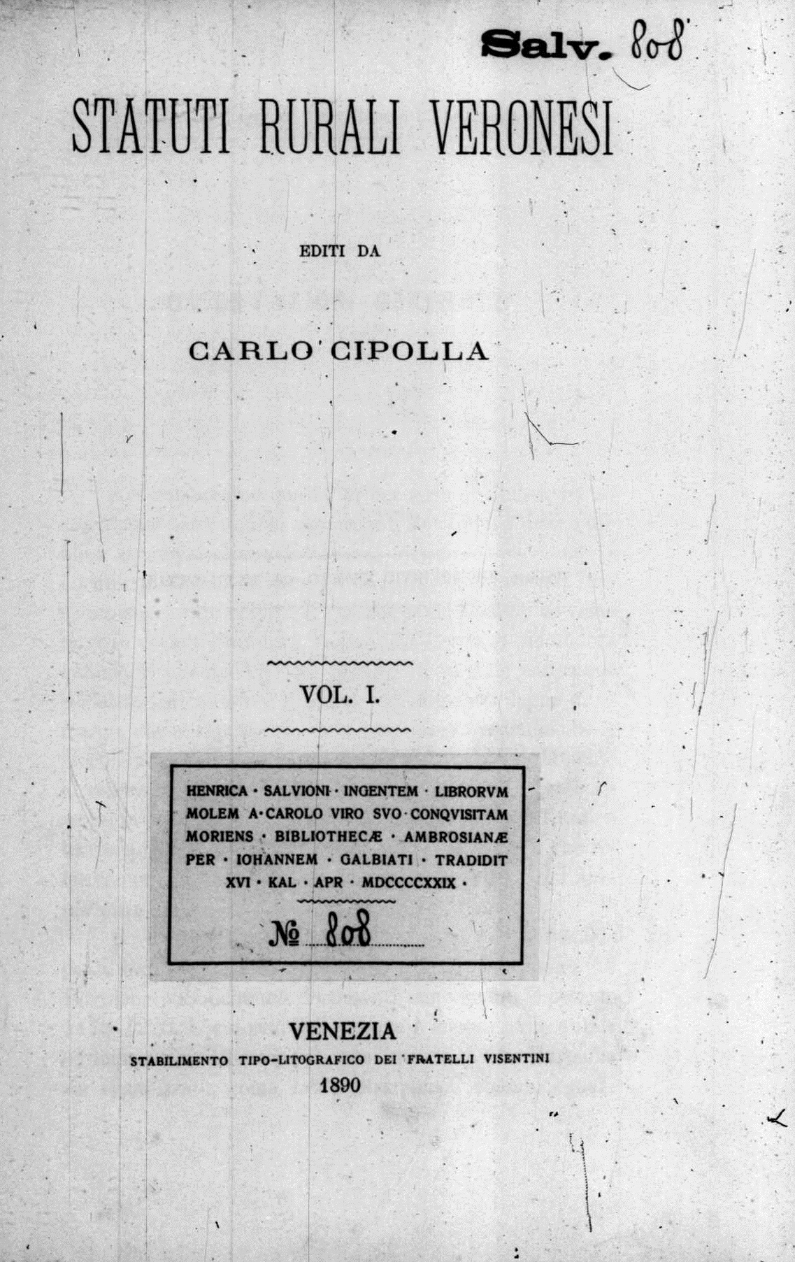 Frontespizio